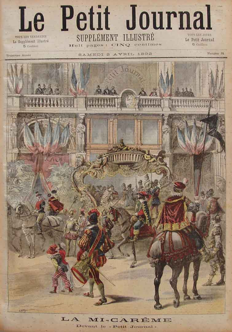 Le char de la Reine des Reines de Paris 1892 devant le siège du Petit Journal rue Lafayette.